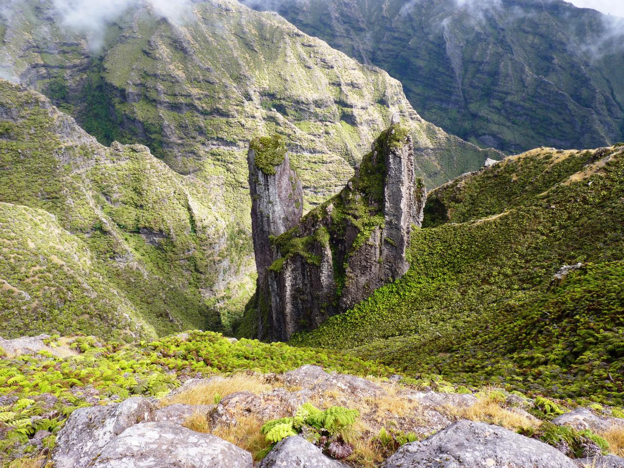 Isla Alejandro Selkirk. Notable formacion Geologica ubicada en el nacimiento de la Quebrada Las Vacas, a 1000 msnm